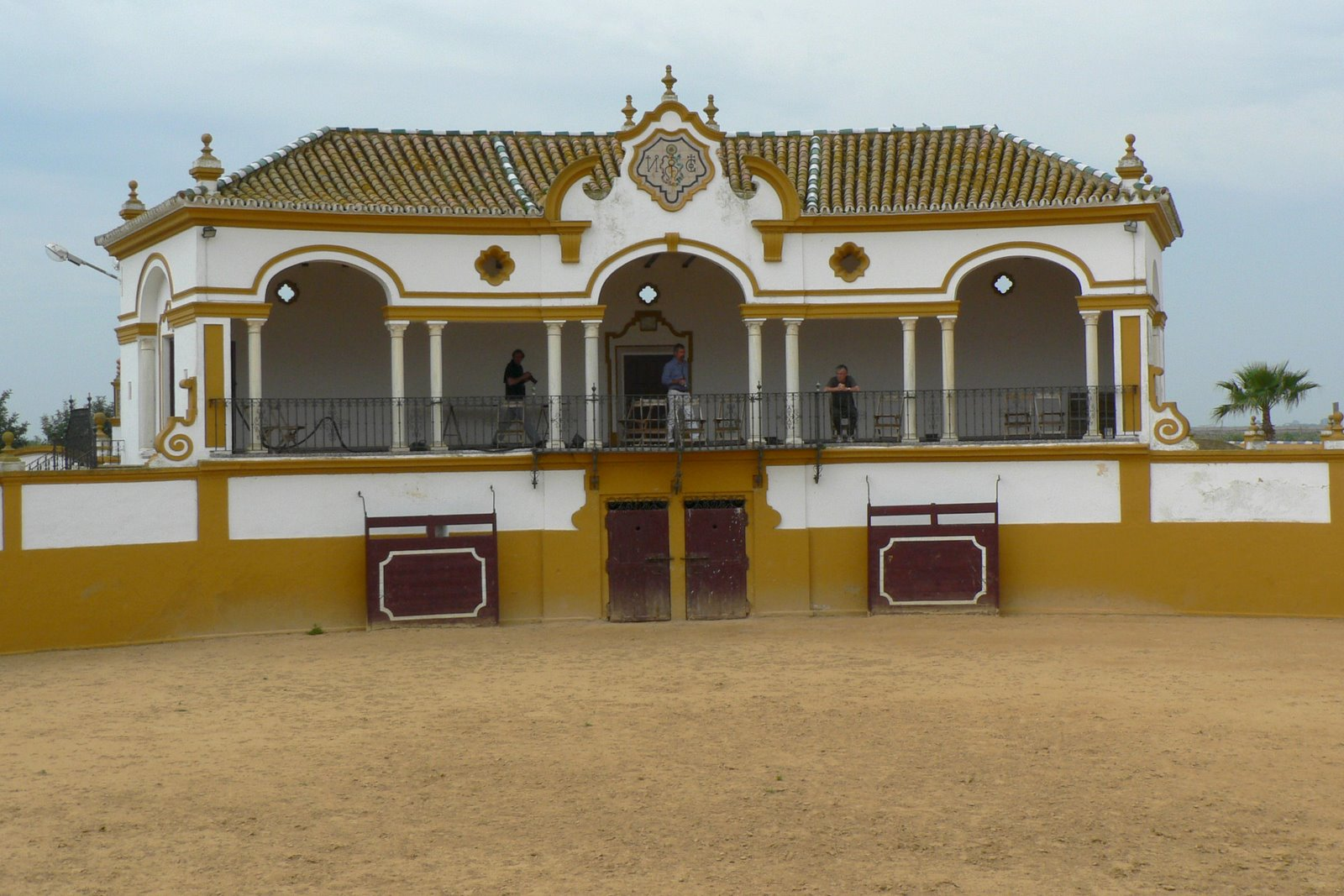 Les arènes de l'hacienda Isla Mínima del Guadalquivir, près de Mairena del Aljarafe, en 2007.